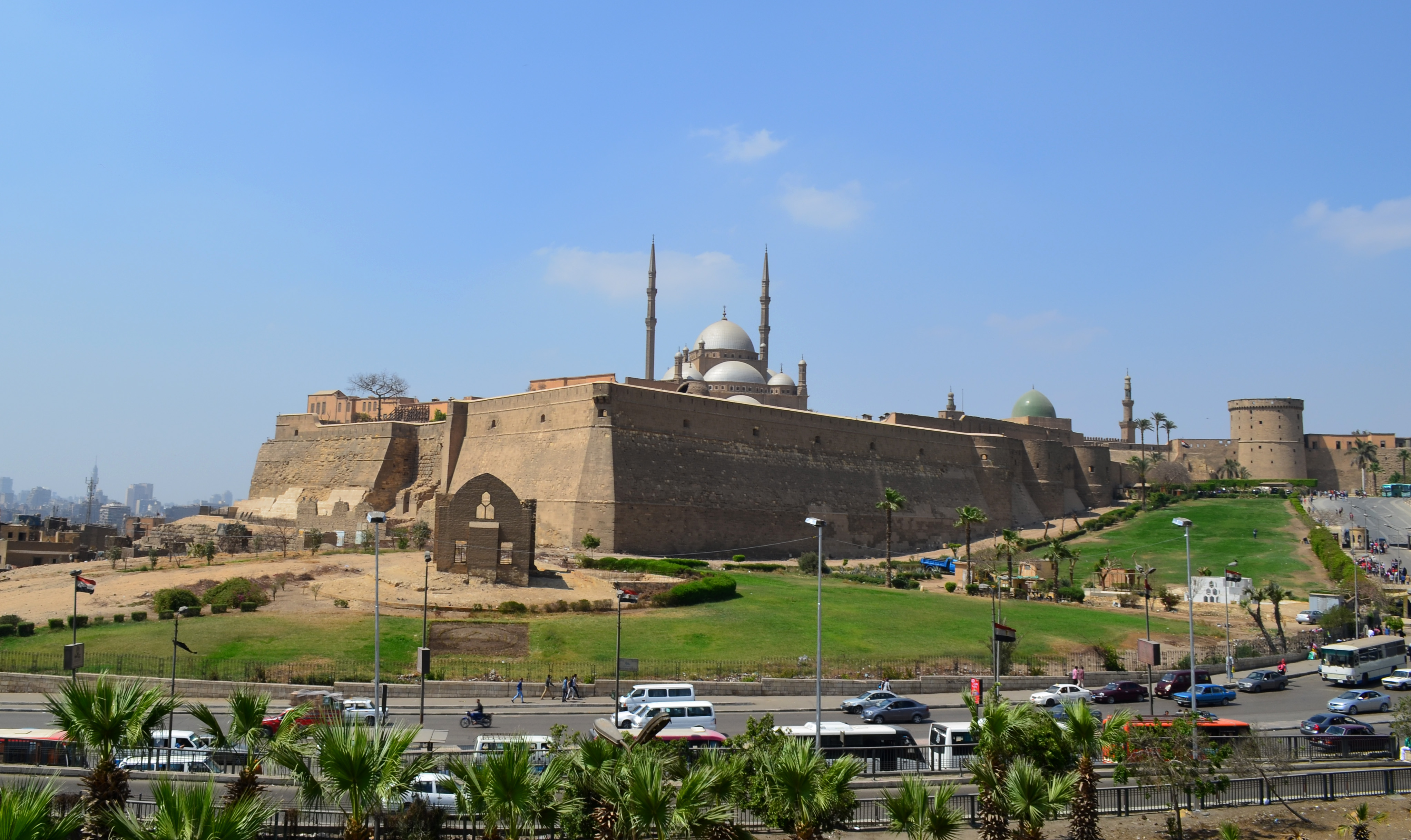 مشهد بانورامي لقلعة صلاح الدين و يظهر بها مسجد محمد علي باشا ومسجد محمد بن قلاوون